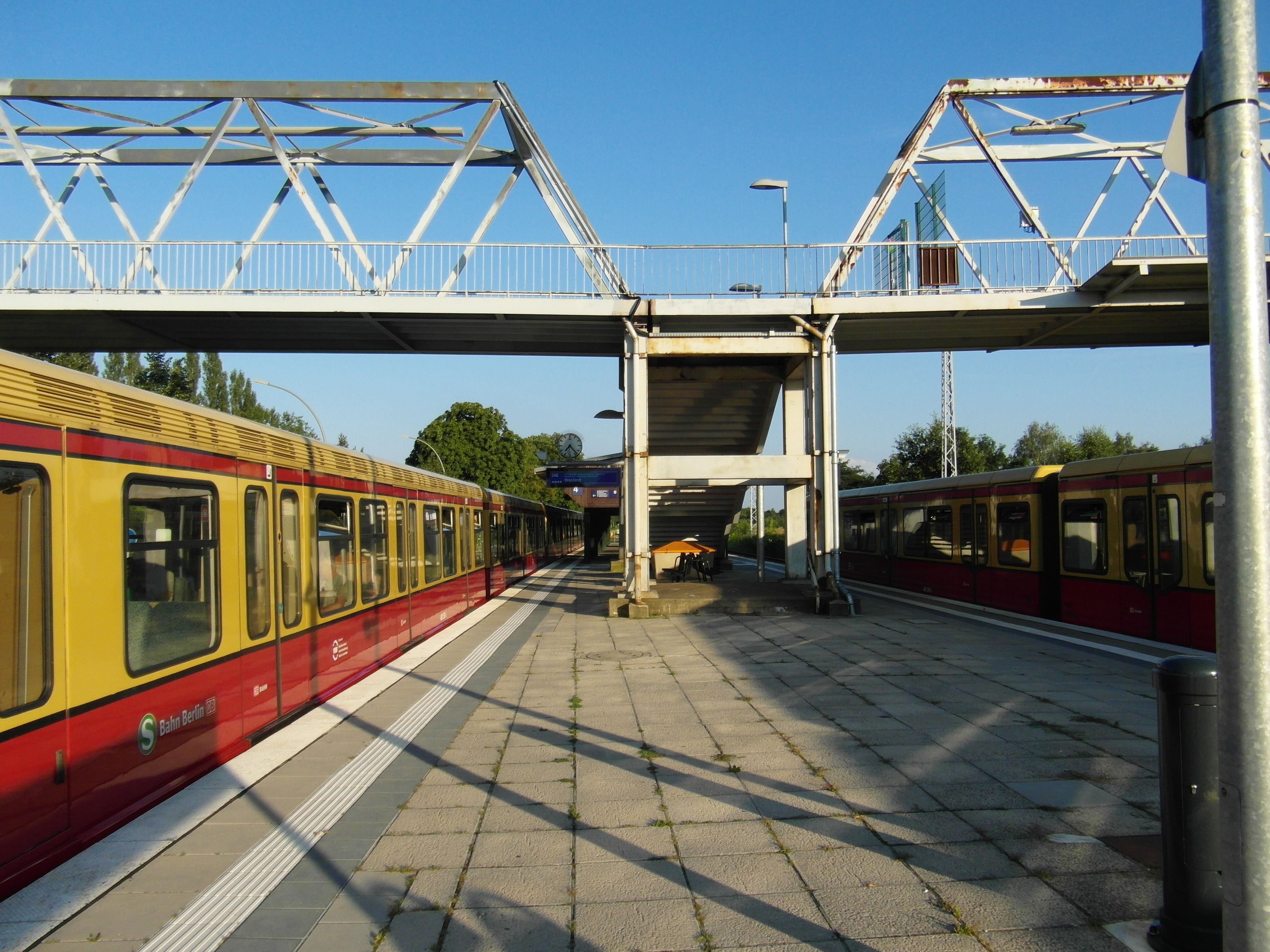 Berlin - S-Bahnhof Betriebsbahnhof Schöneweide